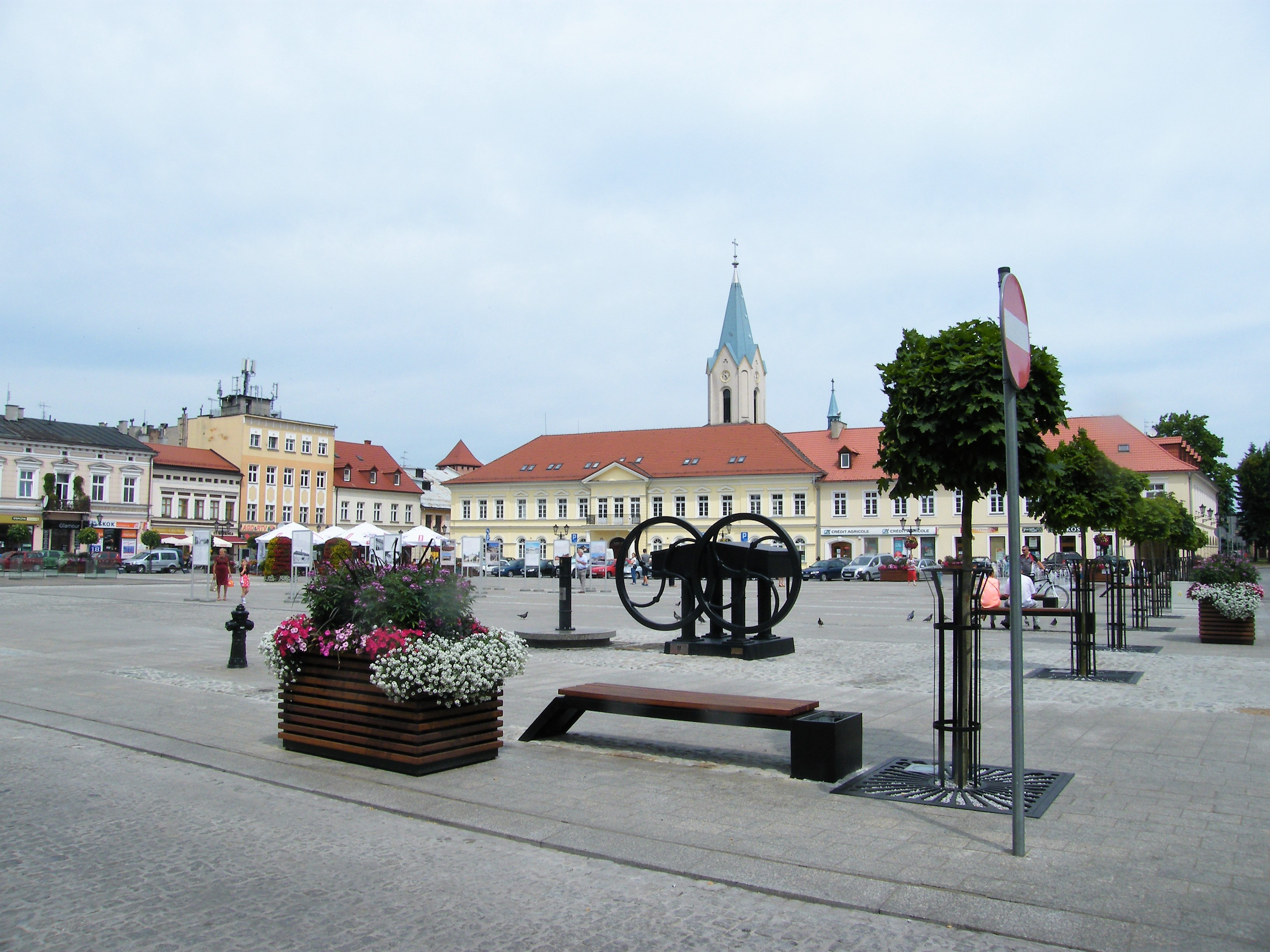 Oświęcim, układ urbanistyczny, XIV/XV, XIX/XX